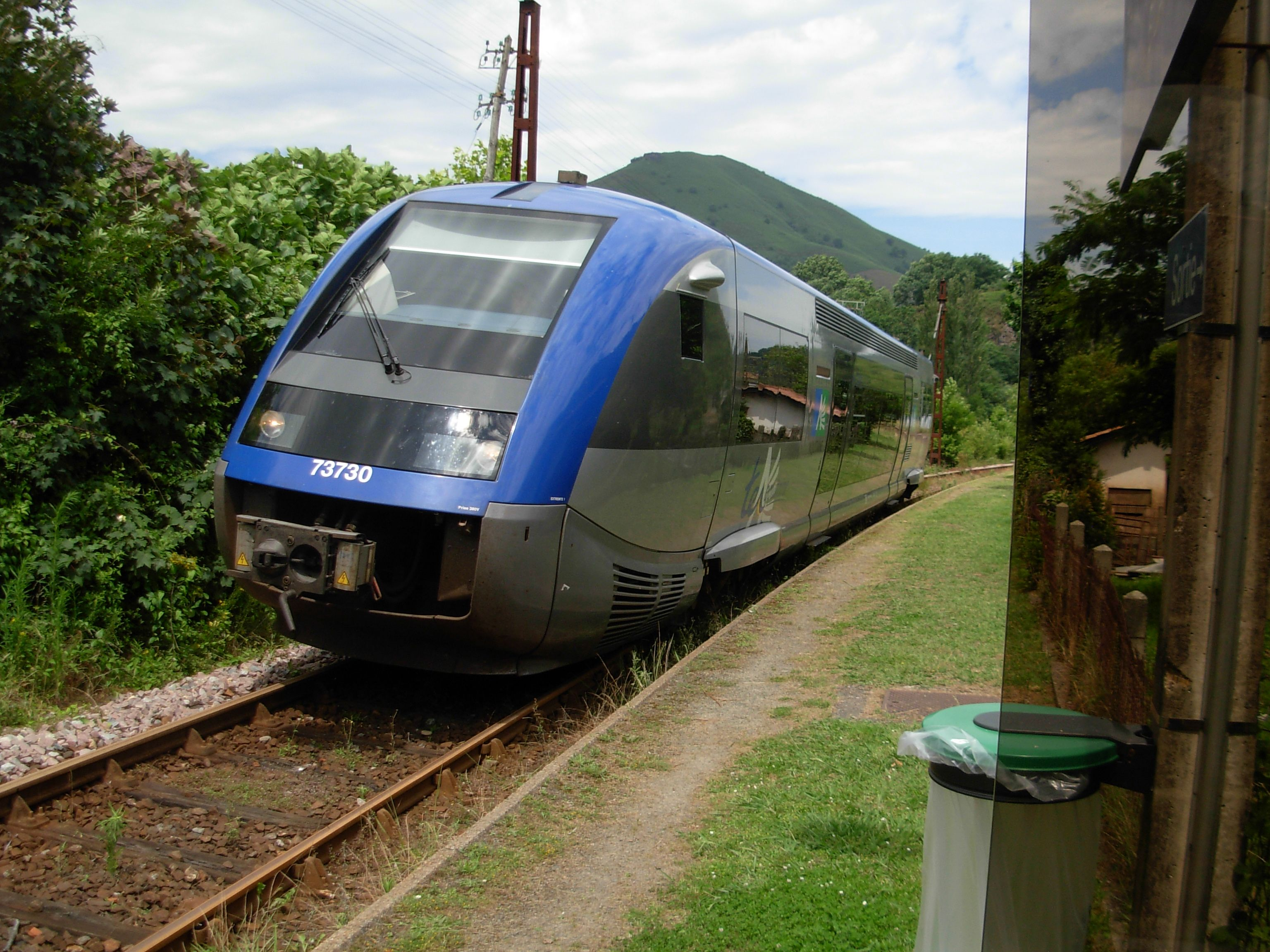 Autorail Diesel à la station PontNoblia-Bidarray;ligne Bayonne-StJeanPied-dePort